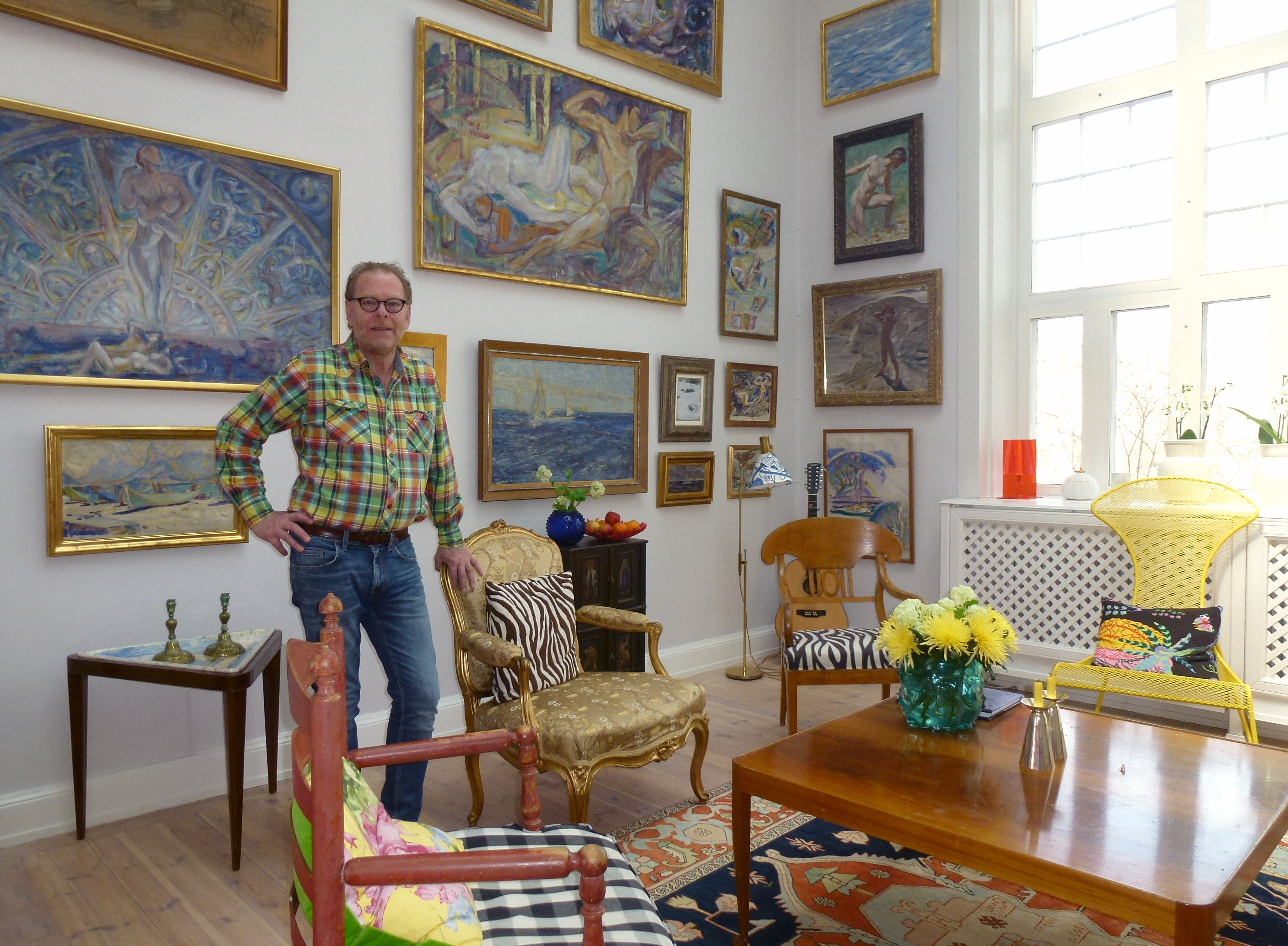 Villa Akleja och ägaren Claes Moser i ateljén